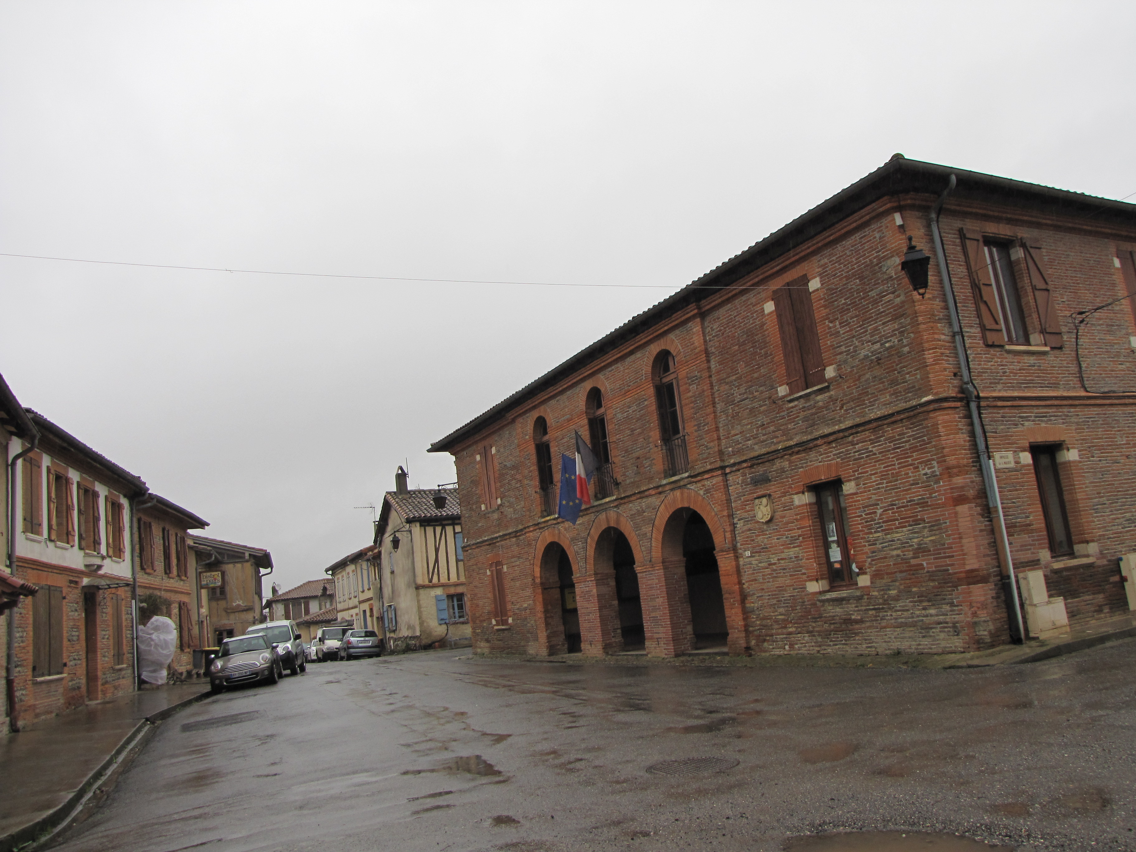 Poucharramet